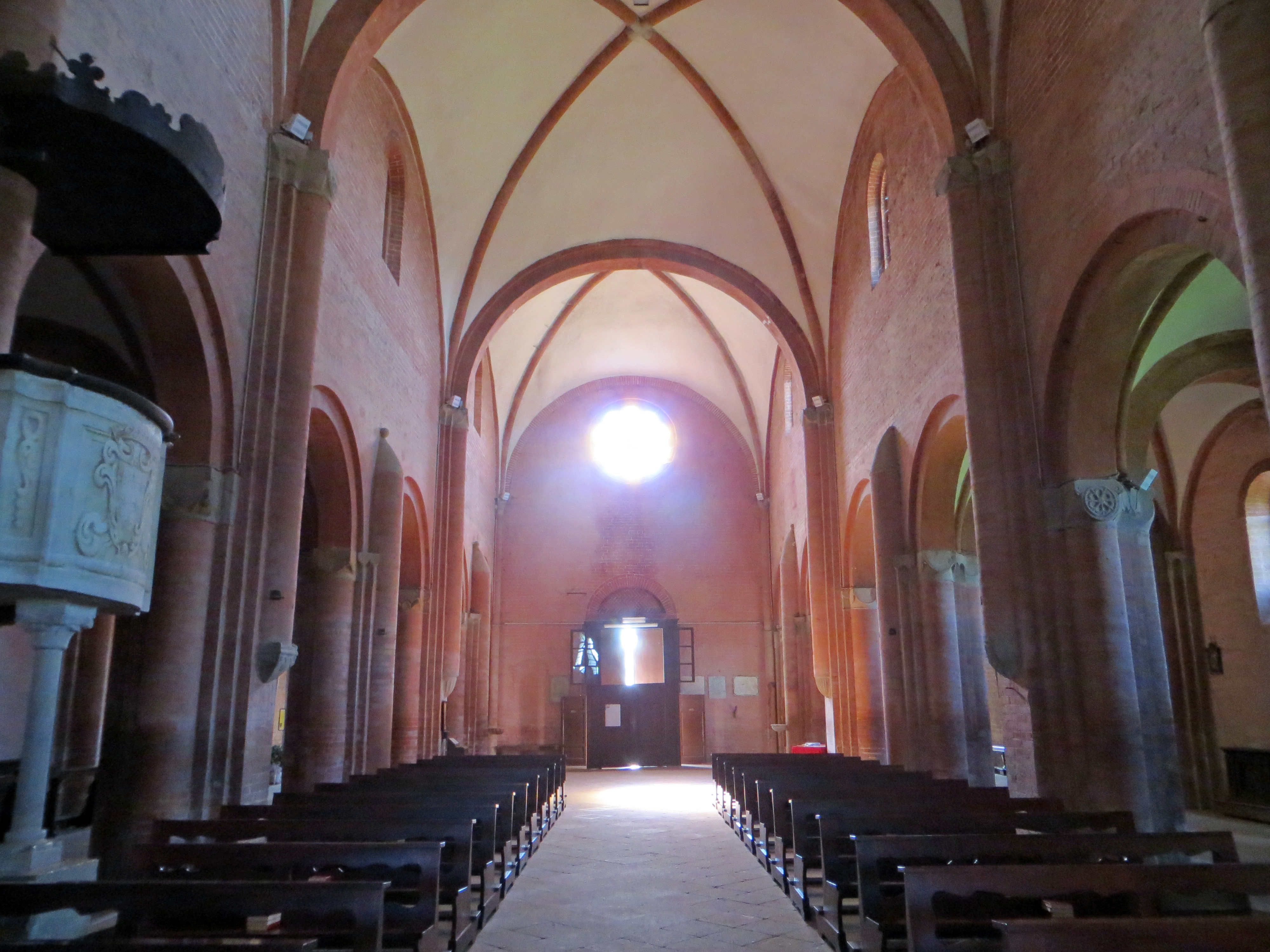 Abbazia di San Bernardo (Fontevivo) - navata centrale e controfacciata